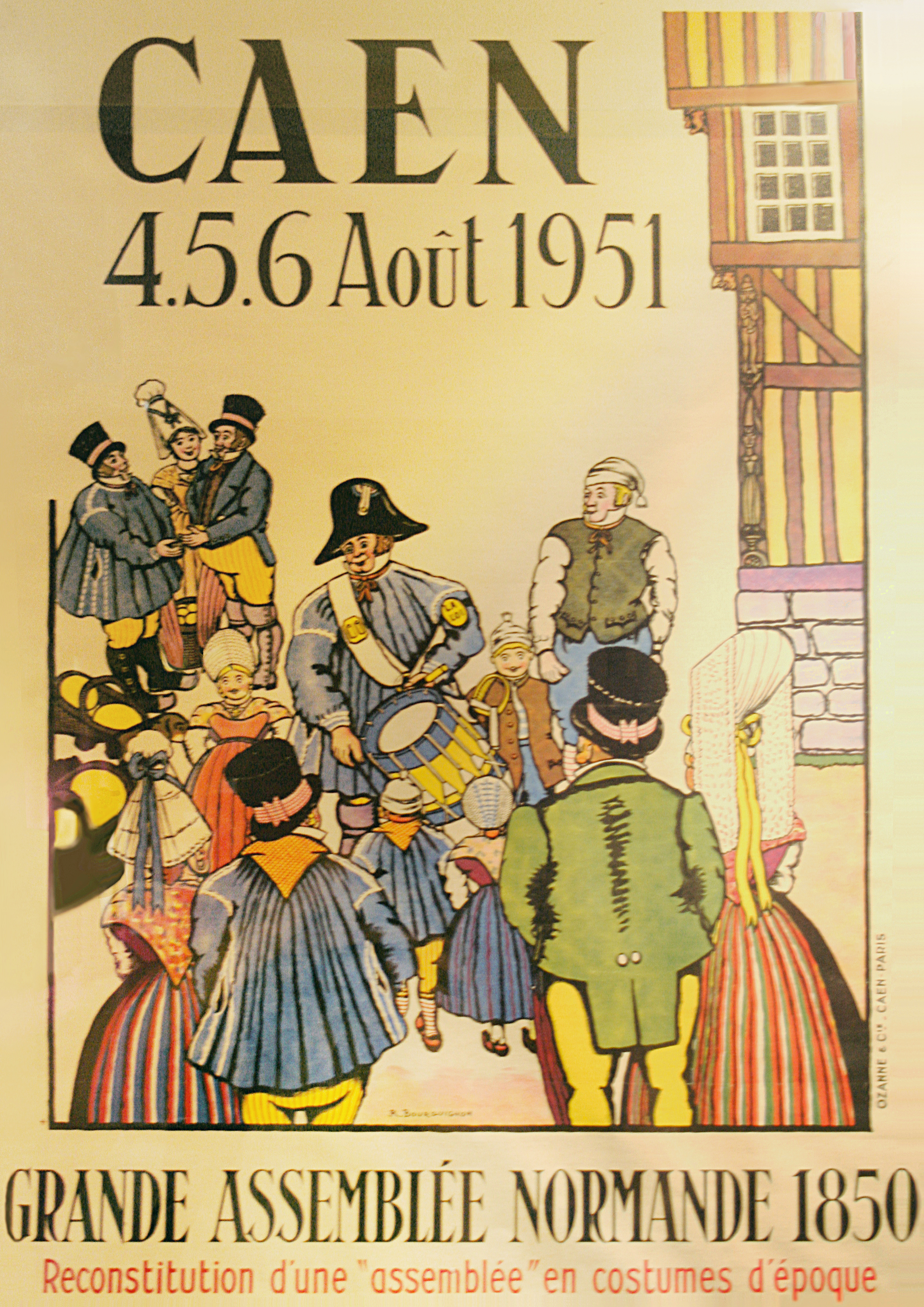 Affiche datant de 1951 invitant à une reconstitution d'une assemblée normande en costumes historiques de 1850 à Caen. dessin : R. Bourguignon ? (signature au milieu en bas) impression : Ozanne et Cie Caen Paris (à droite)